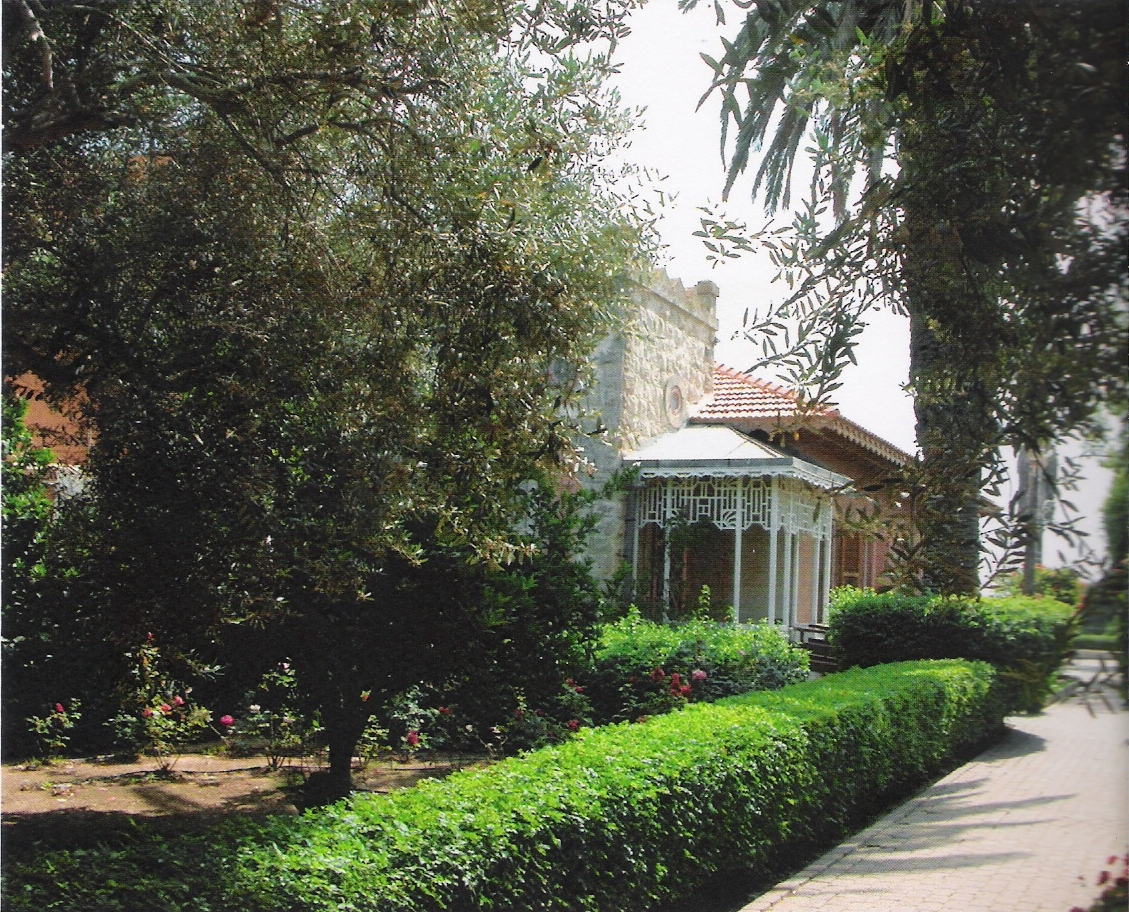 תמונה יפה של בית אהרונסון בזכרון יעקב